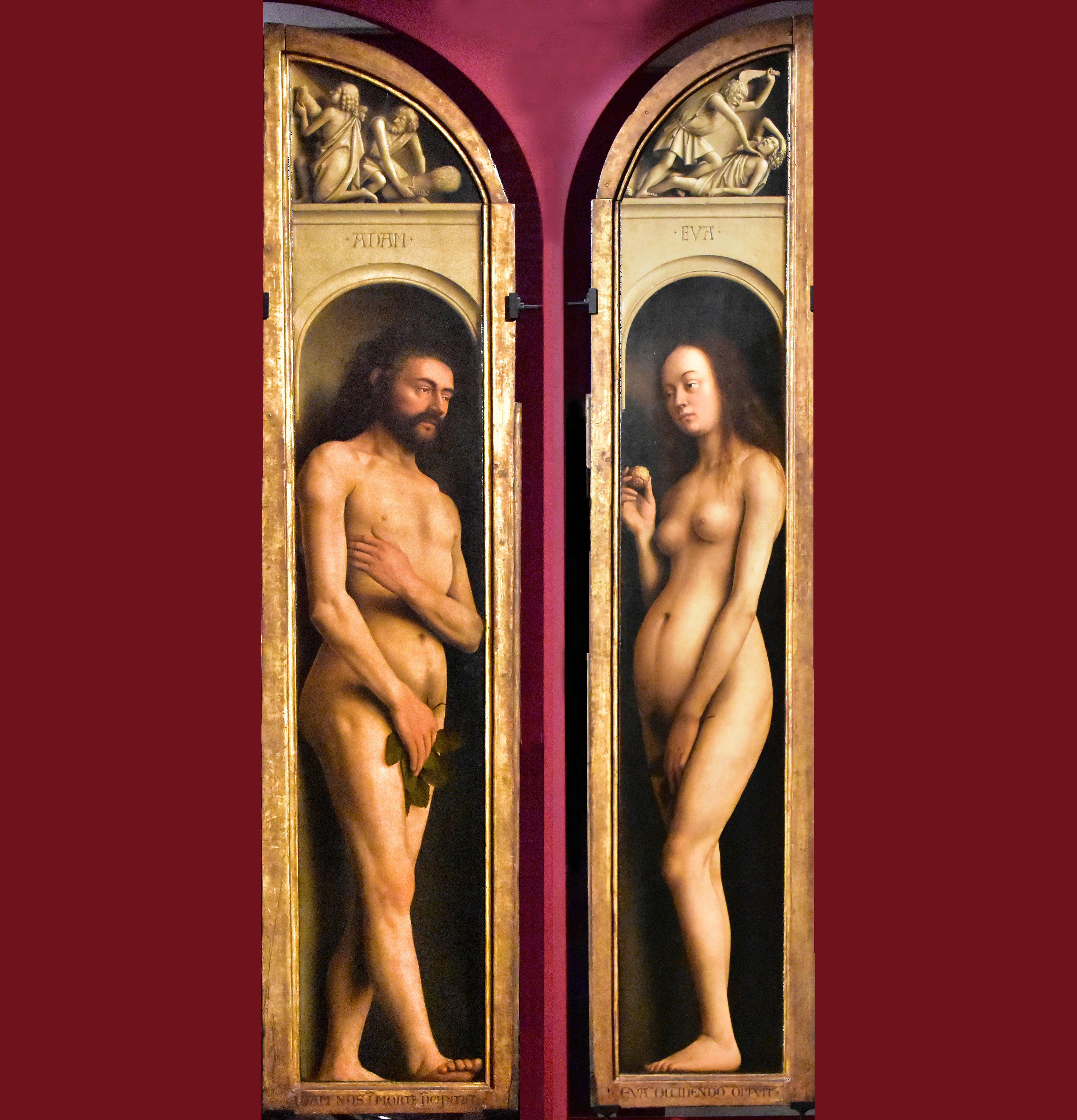 Adam en Eva Van Eyck een optische revolutie 3-02-2020